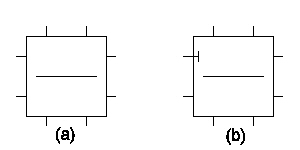 Autore: Ede Licenza: pubblico dominio Descrizione: Rappresentazione simbolica dell'adattatore serie di un filtro digitale ad onda. (a) Senza porta priva di riflessione (b) Con porta priva di riflessione